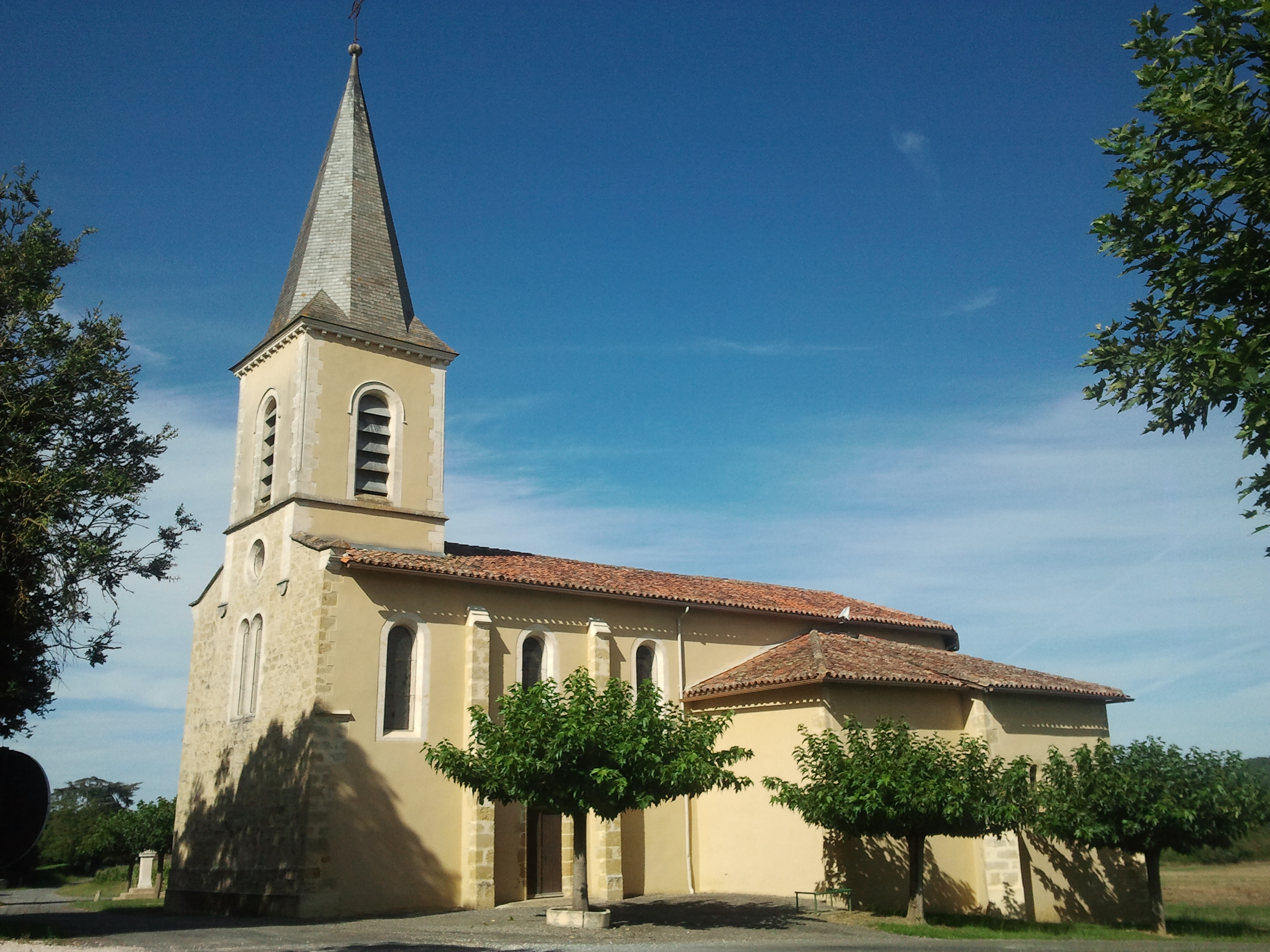 L'église Saint-Pierre-et-Saint-Paul à Labarthe